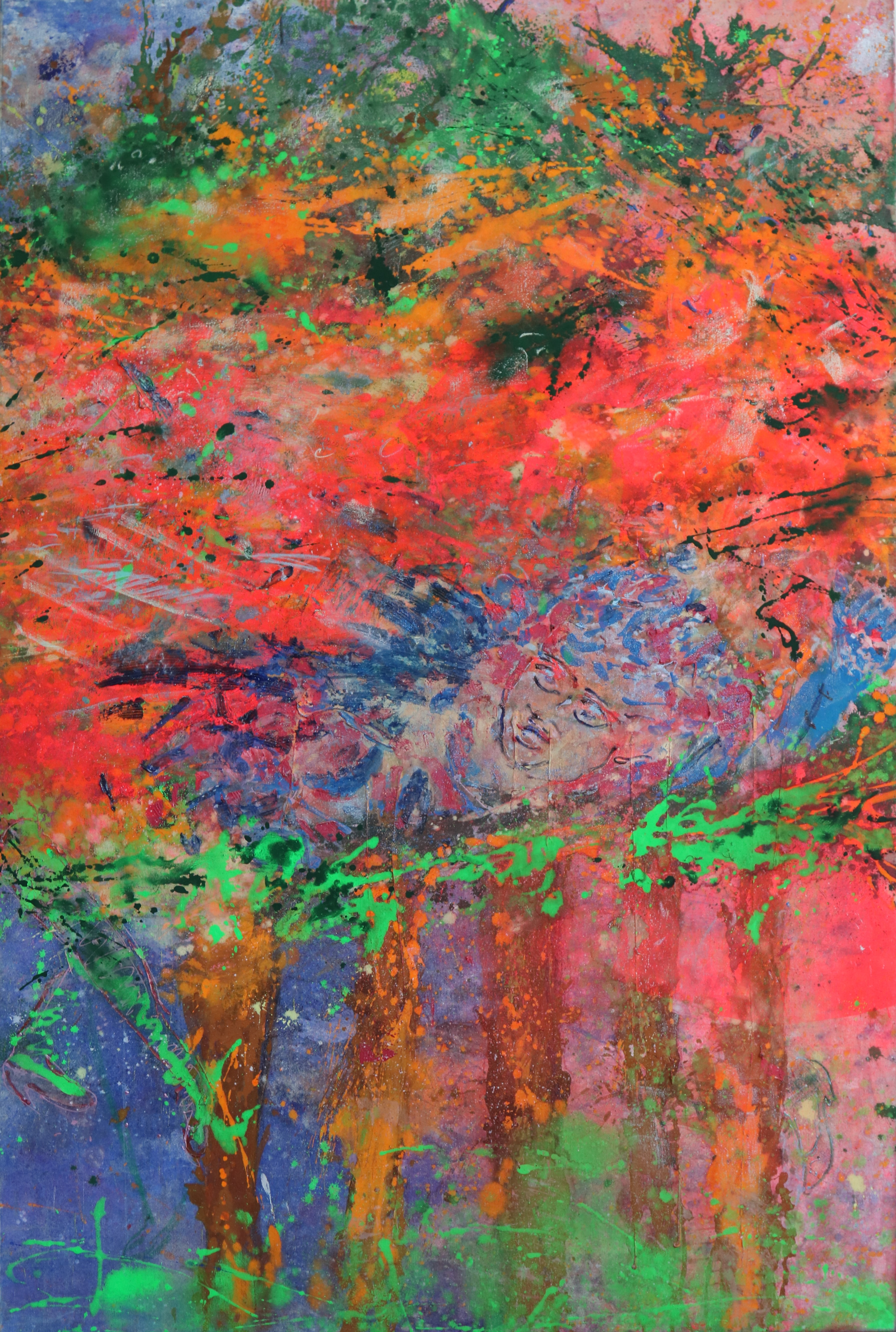 Superweib im Märchenwald.Werkgruppe Amazonen Malerei auf Nessel, 160x 130, 2012